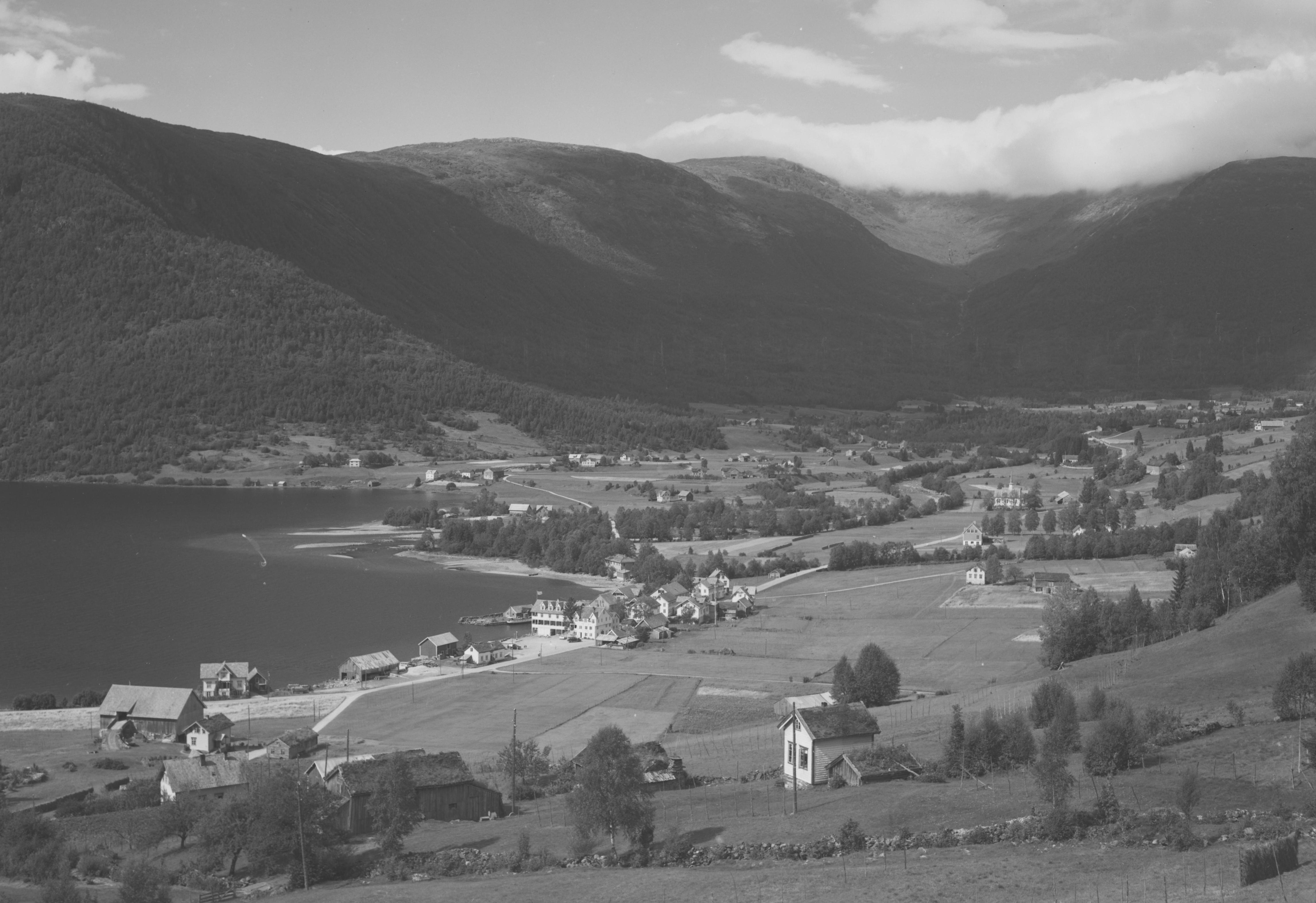 Bildet er hentet fra Nasjonalbibliotekets bildesamling. Anmerkninger til bildet var: Fotograf :Ukjent Grodås,Hornindalsvatnet, Hornindal, Sogn og Fjordane